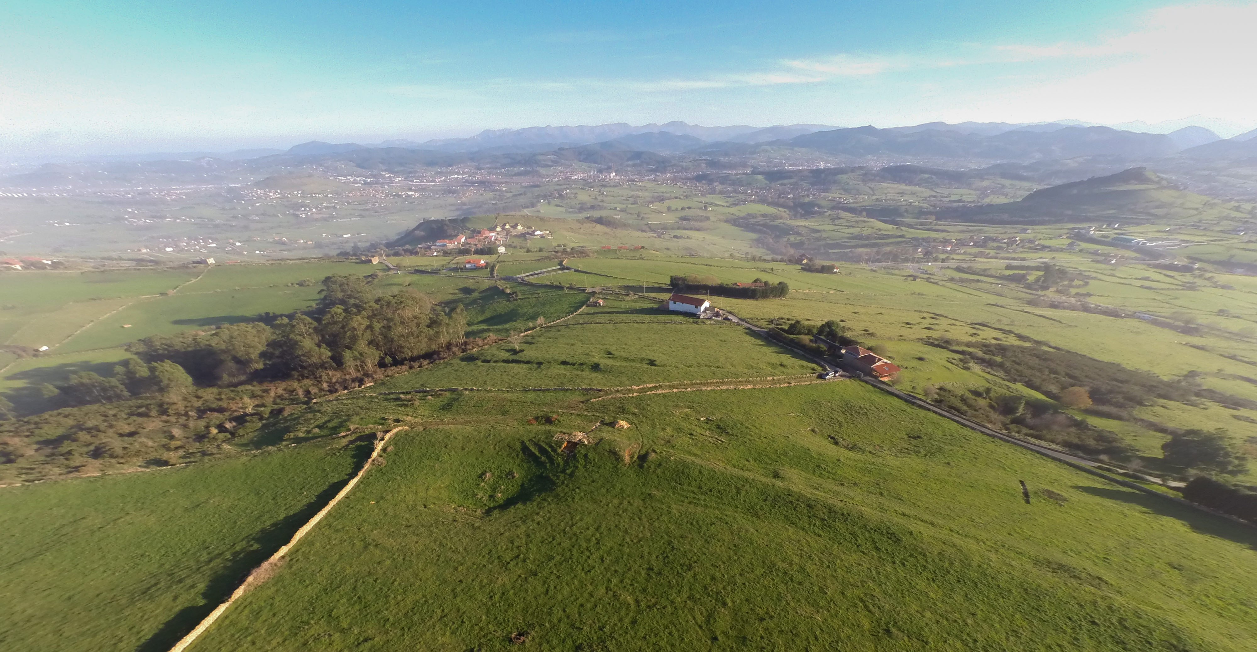 Vista aérea de drone hacia el sur.